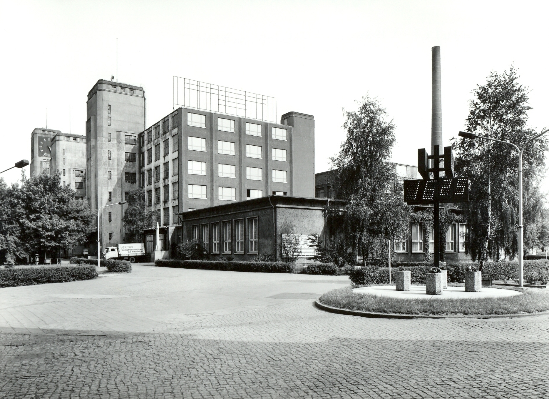 Naehmaschinenwerk_Wittenberge.jpg (Original text: Nähmaschinenwerk Wittenberge)